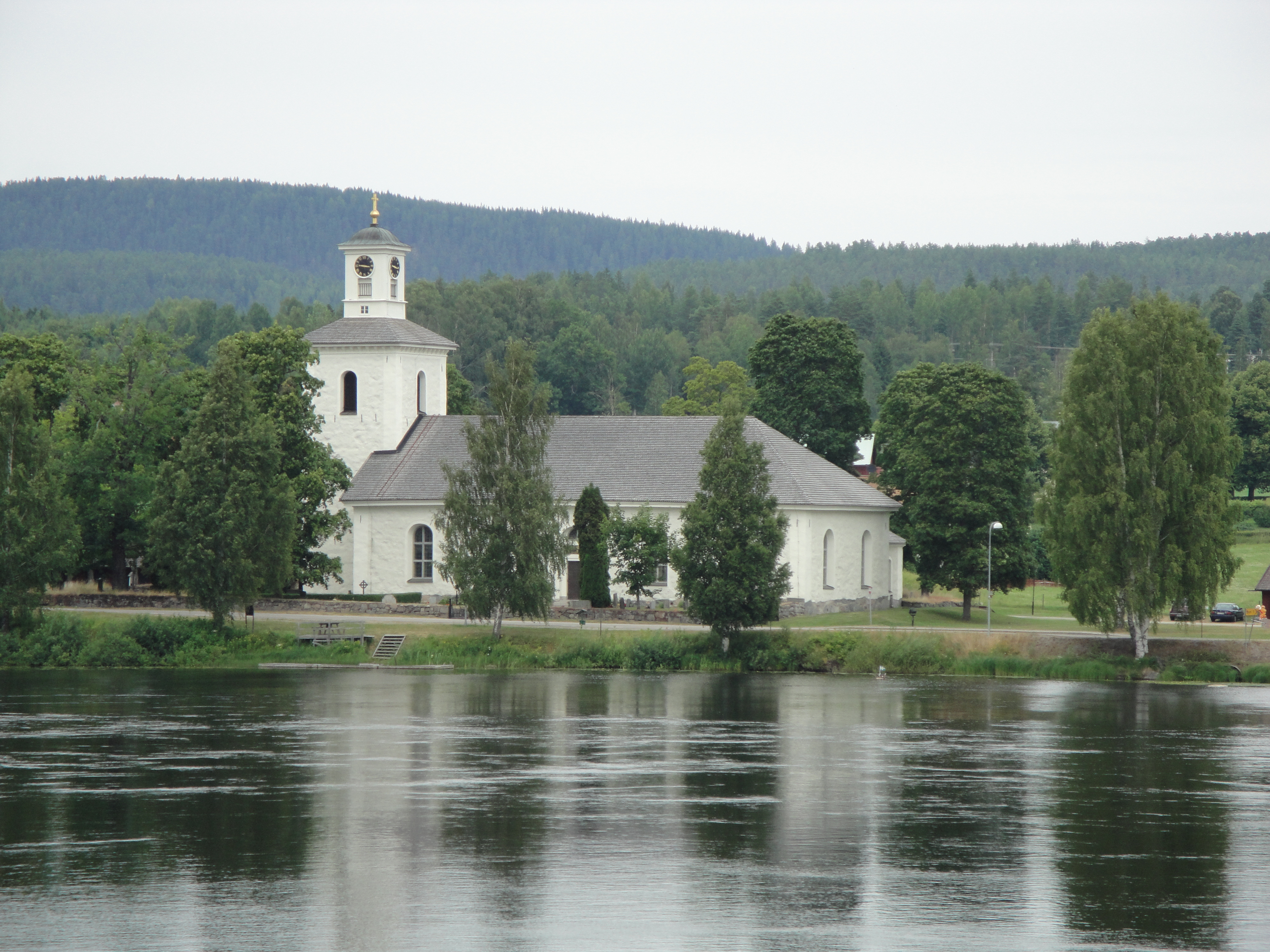 Segersta kyrka, Bollnäs kommun.